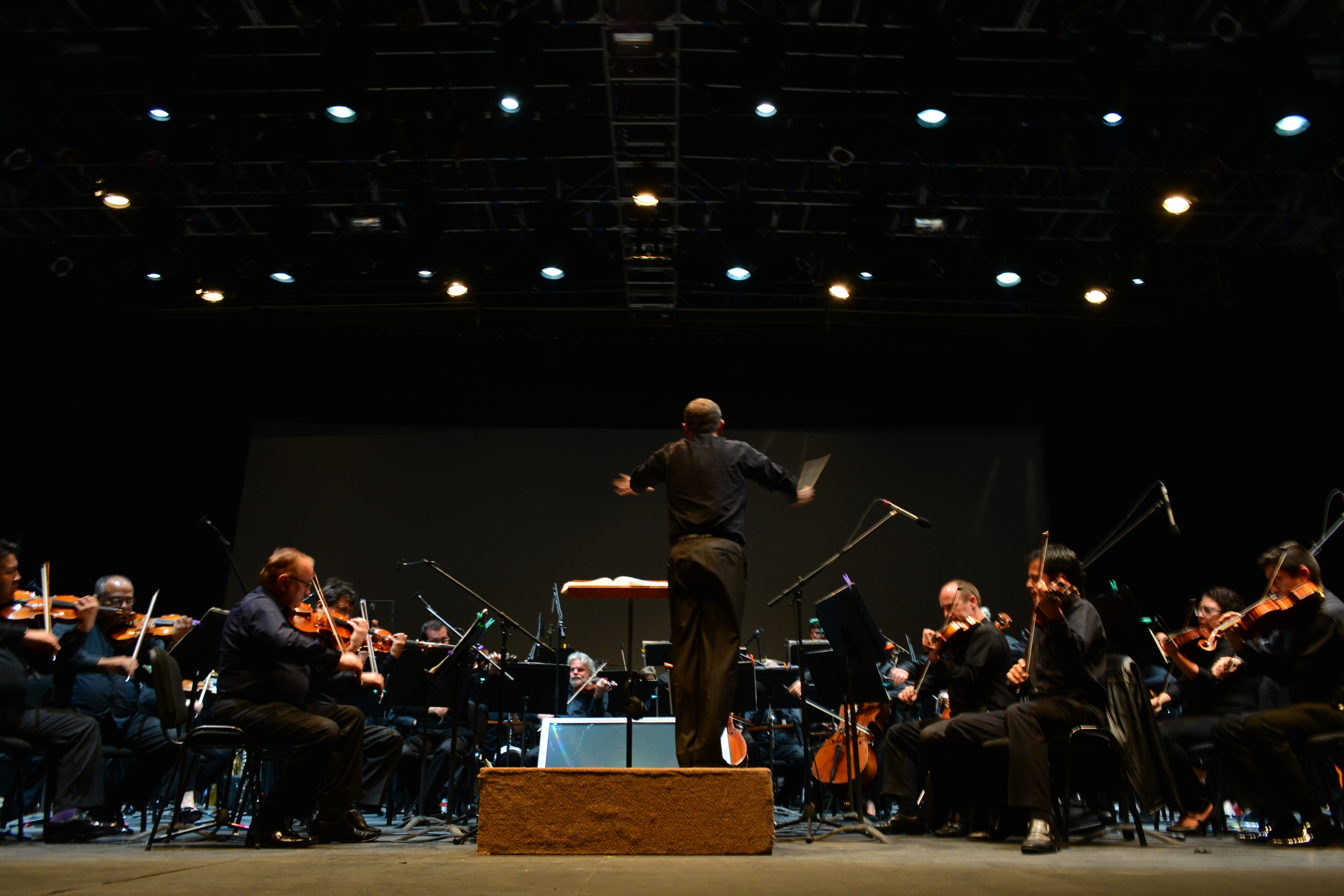 Los planetas de Holst por la Orquesta Sinfónica de Xalapa- Explanada de la Alhóndiga de Granaditas.